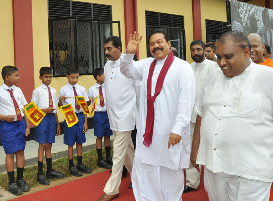 සිංහල: පසුමහින්ද රාජපක්ෂ ගුණරතන විද්‍යාලයේ